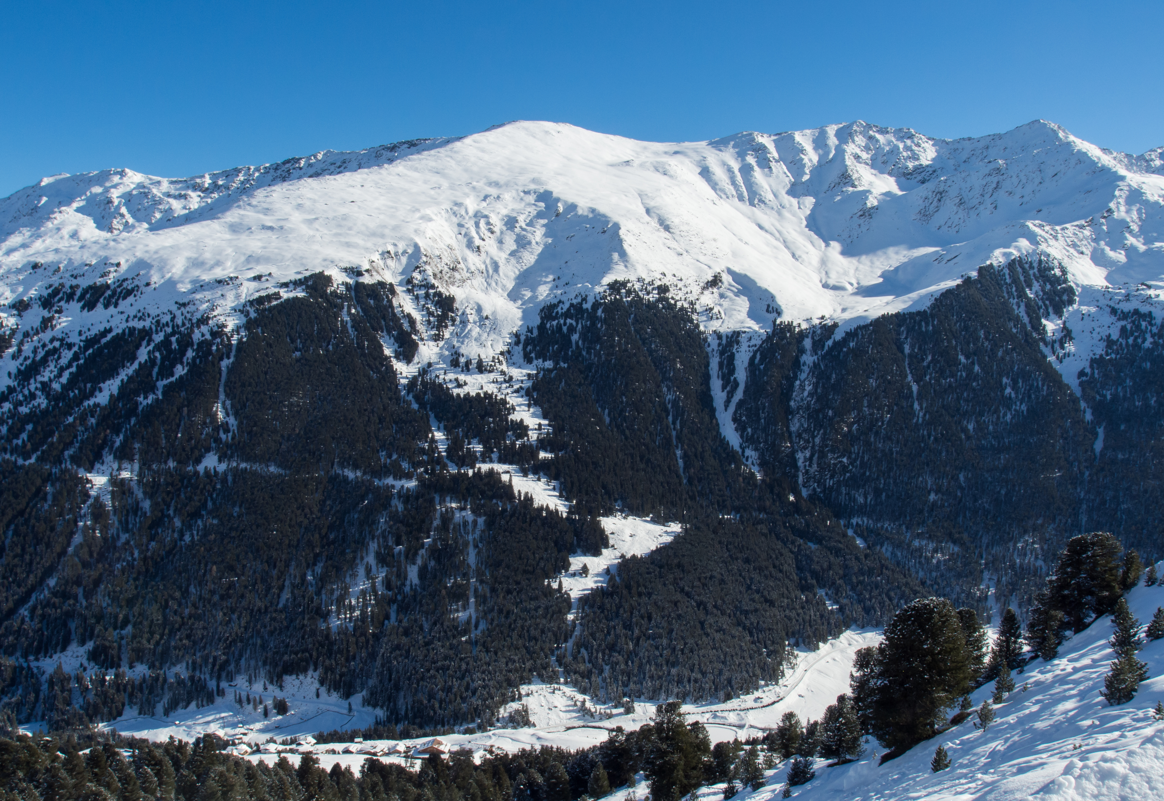 Der Mittelteil des Kamms zwischen dem Lüsens- und dem Fotschertal von Westen gesehen, am unteren rechten Rand Praxmar, Ortsteil von St. Sigmund im Sellrain